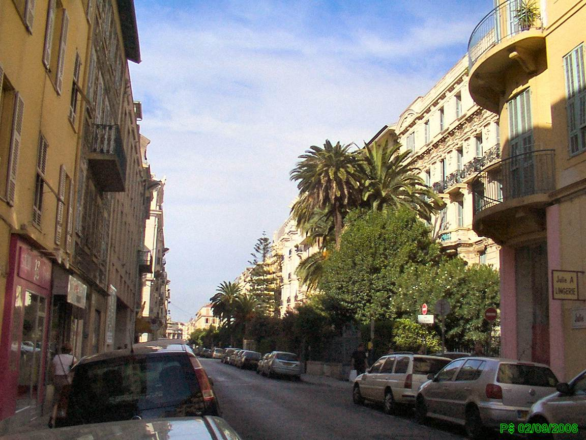 Nice - Palais de Nice L'avenue Maréchal Foch en direction de l'Av. Jean Médecin. Prise de vue ouest, vers 11h30.